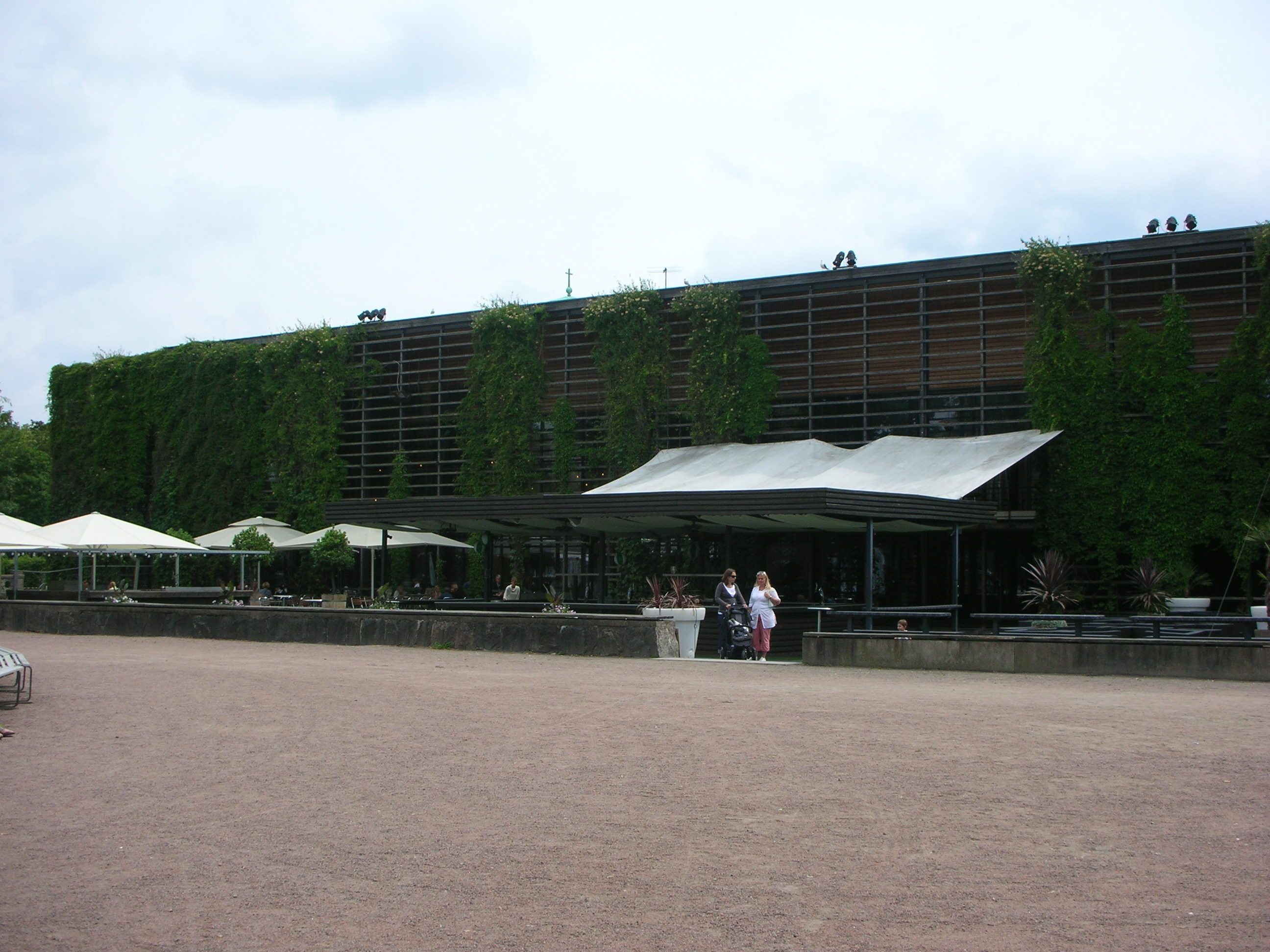 Restaurang Trädgårn sedd inifrån Trädgårdsföreningens park i Göteborg.